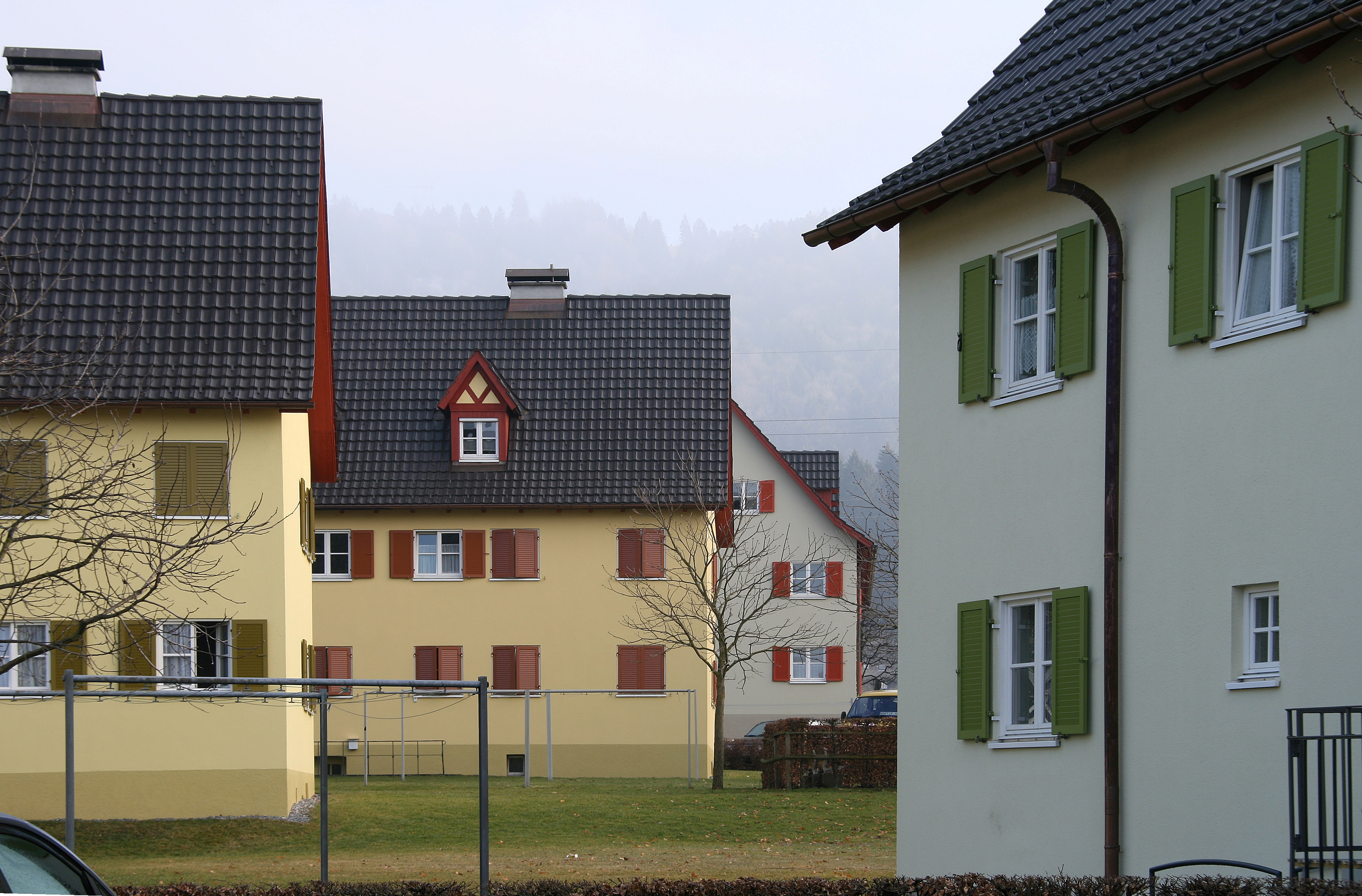 Südtiroler-Siedlung Lochau, Vorarlberg.